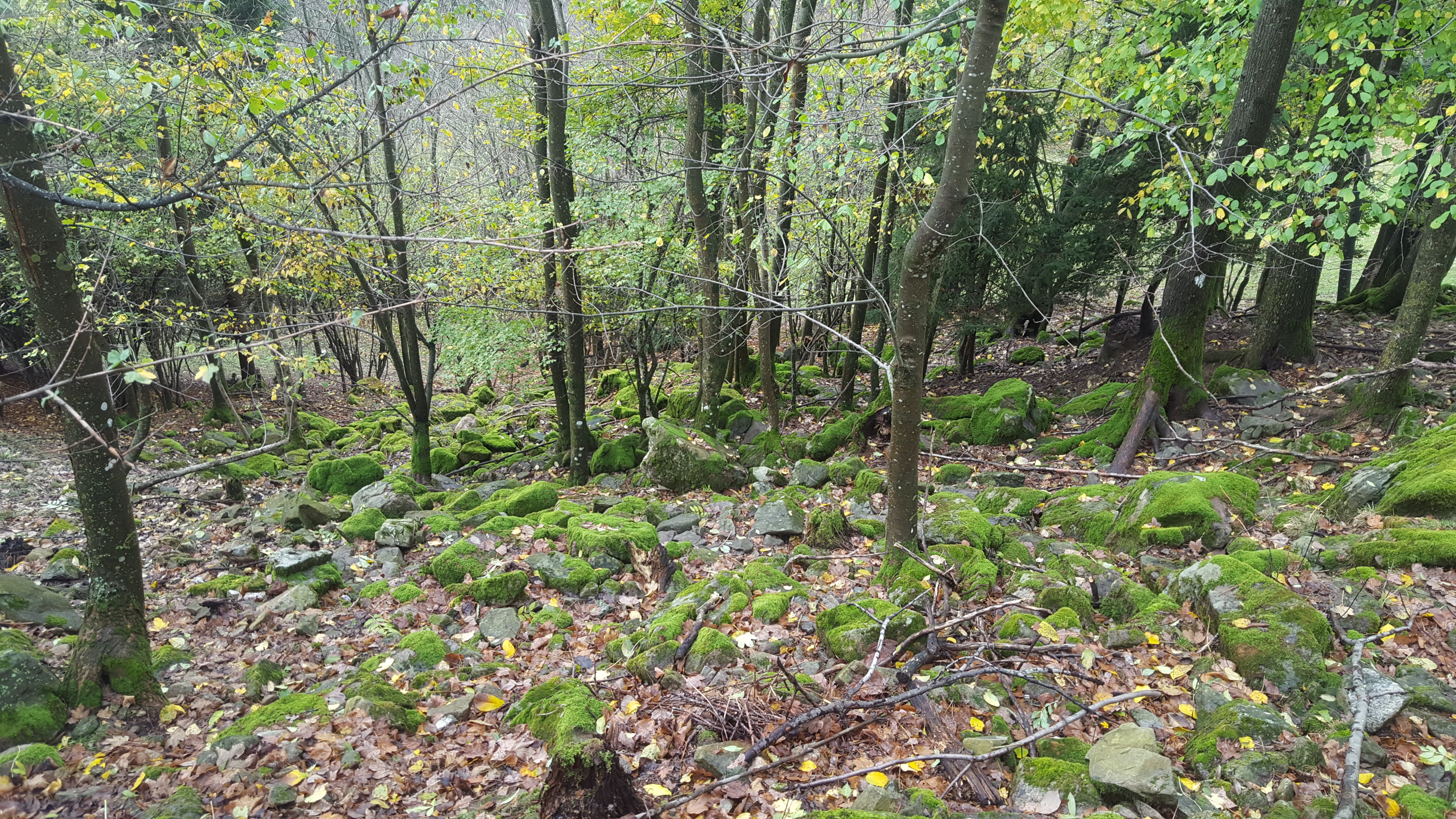 Podlom - kamniti plaz